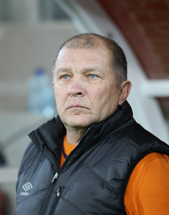 Григорий Викторович Иванов